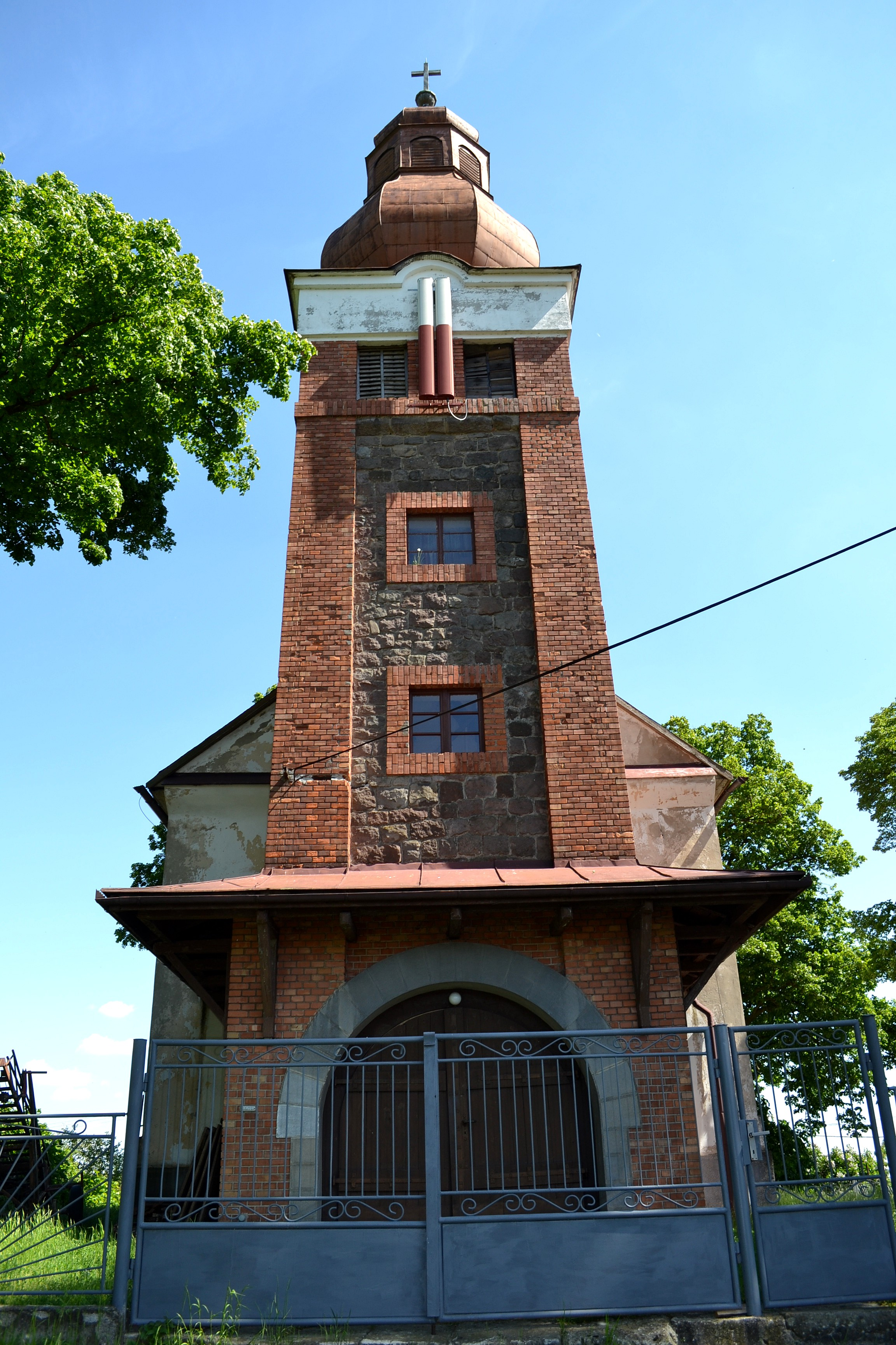 Evanjelický kostol v obci Žibritov (okr. Krupina)